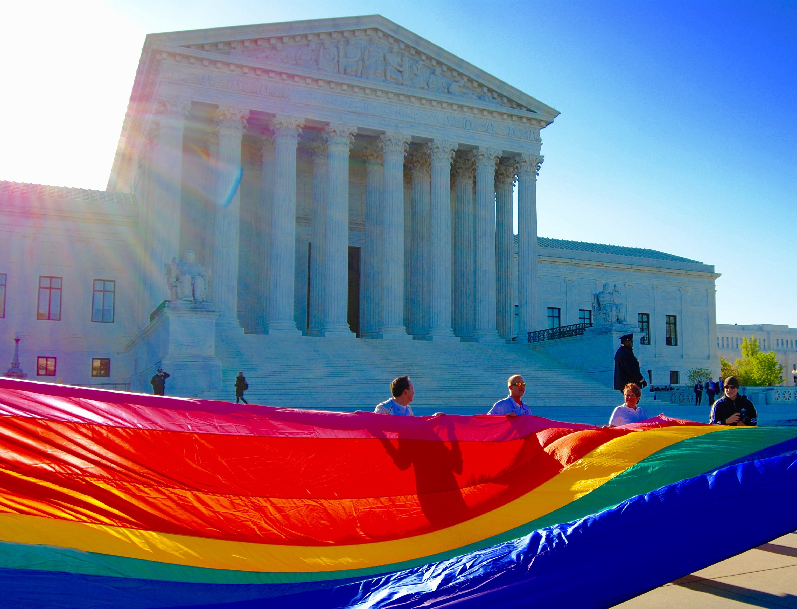 Demonstration in favour of same sex marriage about Obergefell v. Hodges in front of SCOTUS.